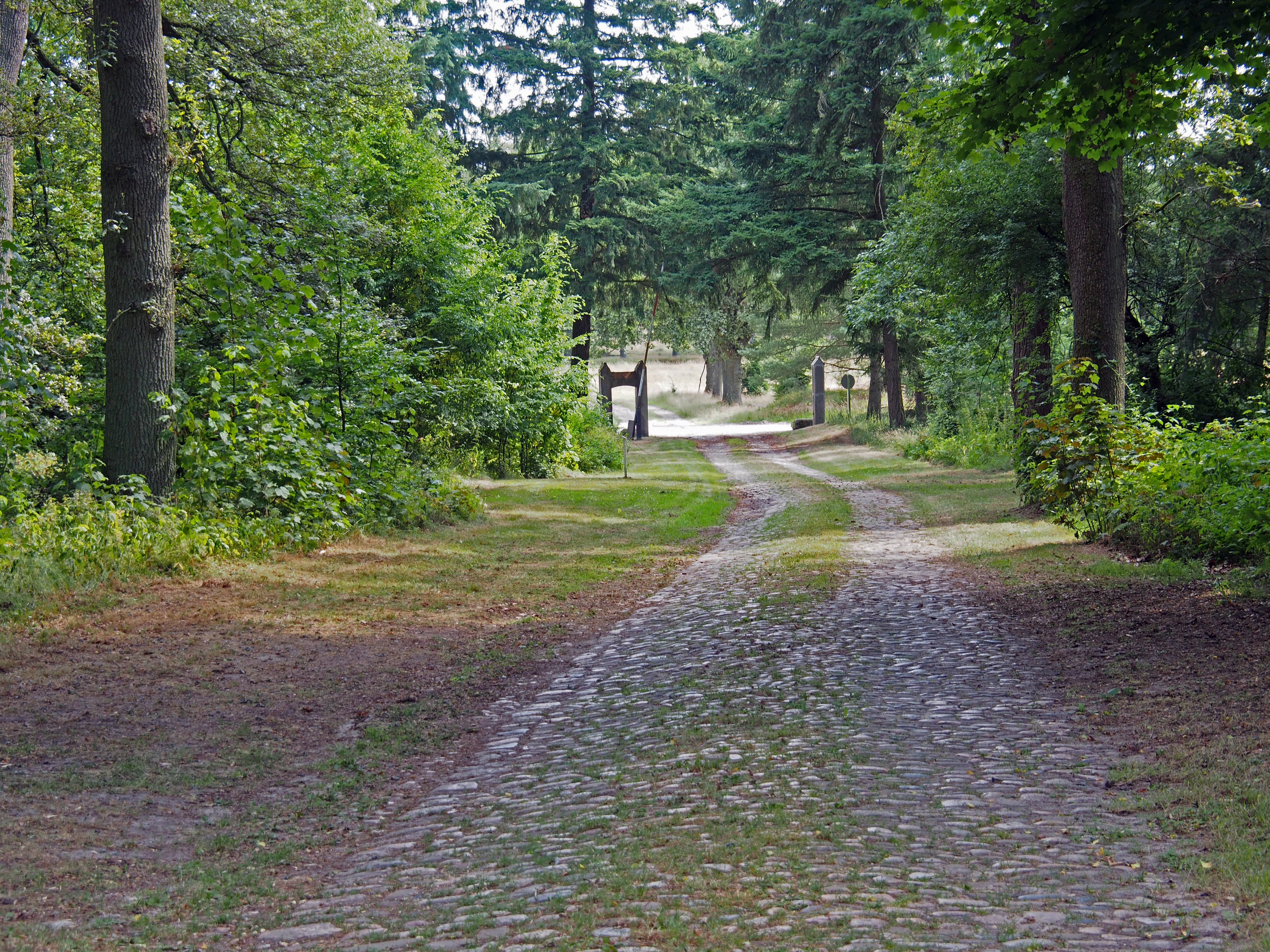 Zufahrt zum ehemaligen Gut Achterberg in der Osterheide, aus Richtung Wardböhmen